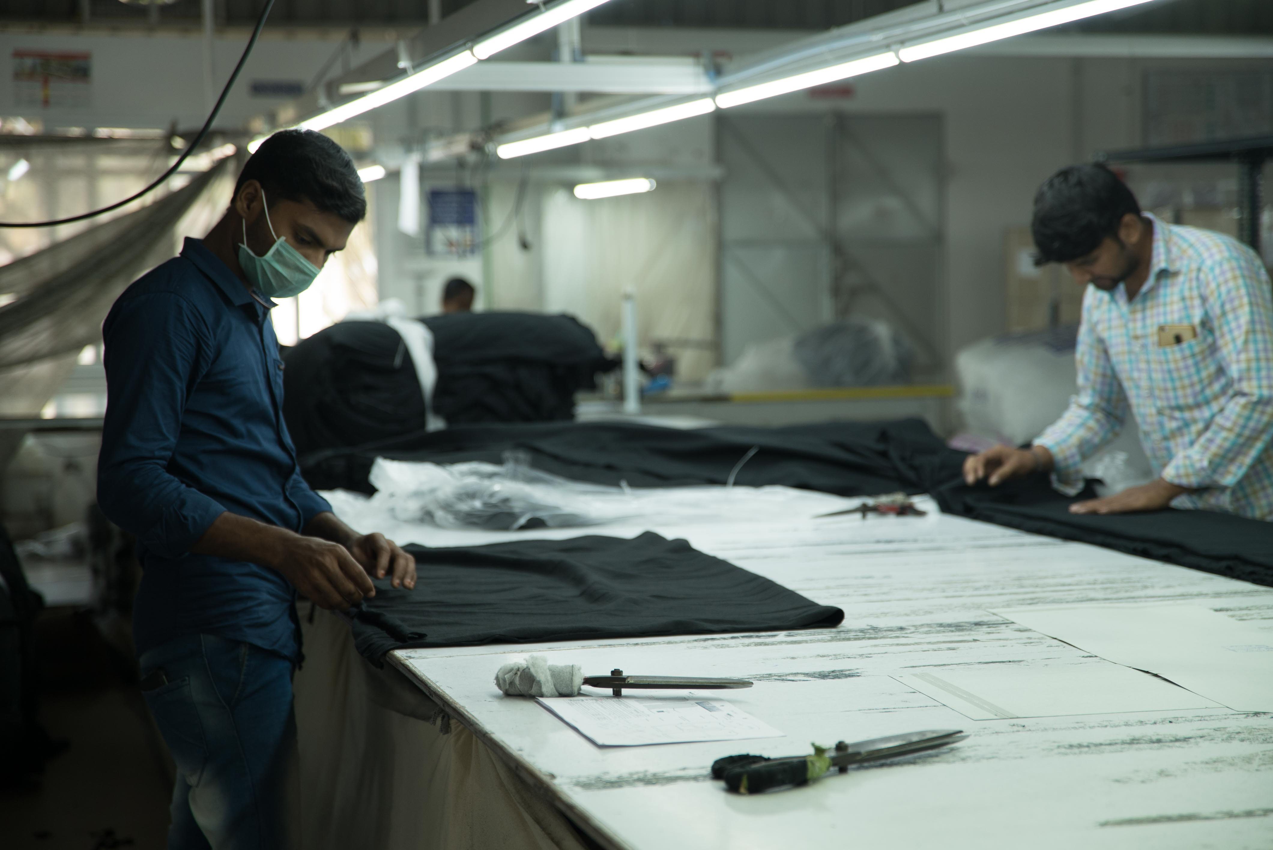 Pure Waste Textiles Oy:n ompelimo Tiruppurissa Intiassa.